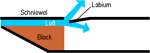 schematesch Duerstellung vun engem Blockflüttemondsteck